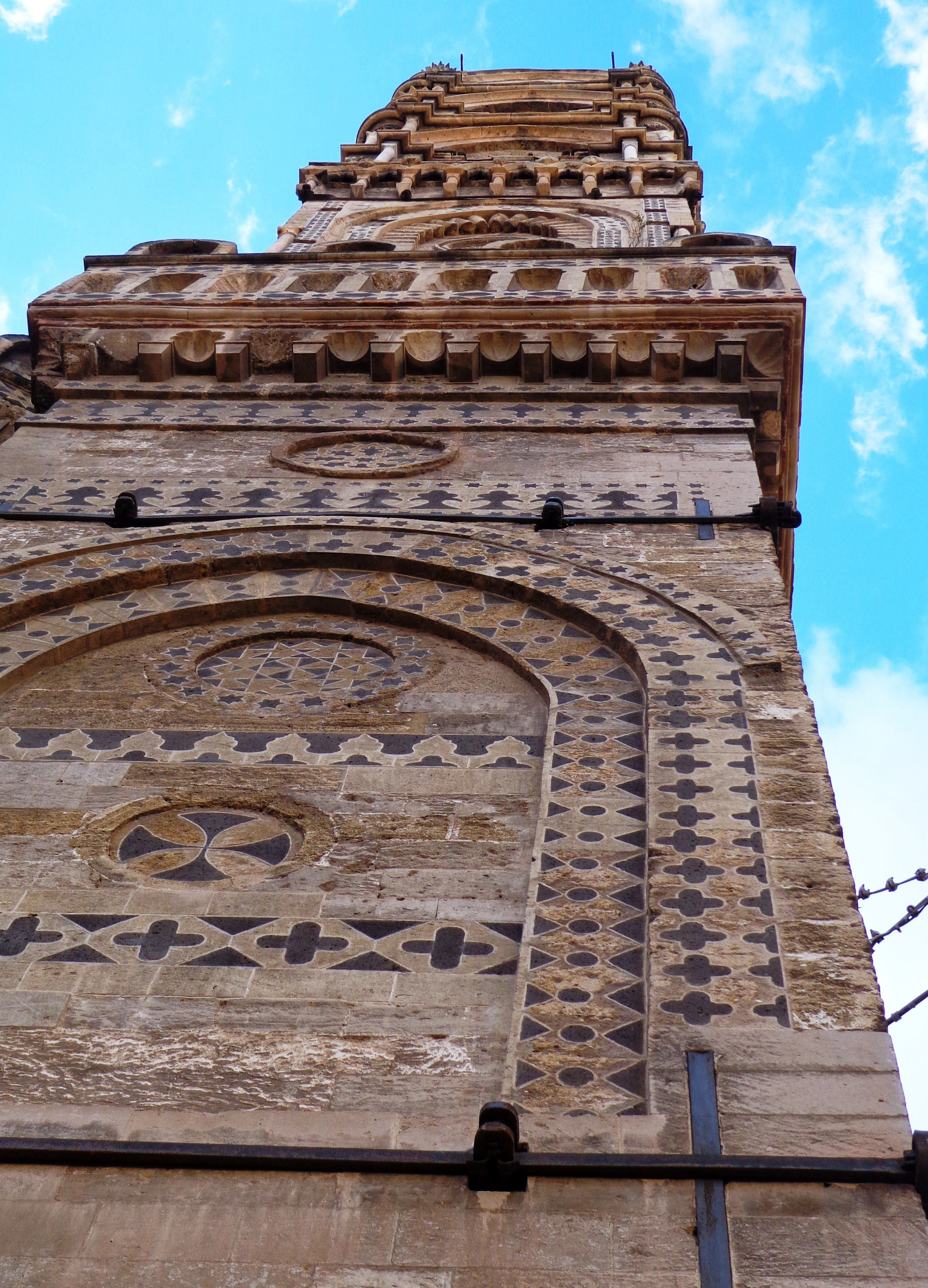 Campanile di Nord Est, dettaglio intarsi